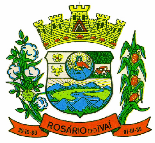 Brasão de Rosário do Ivaí